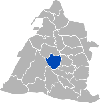 臺灣省彰化縣溪湖鎮地圖。